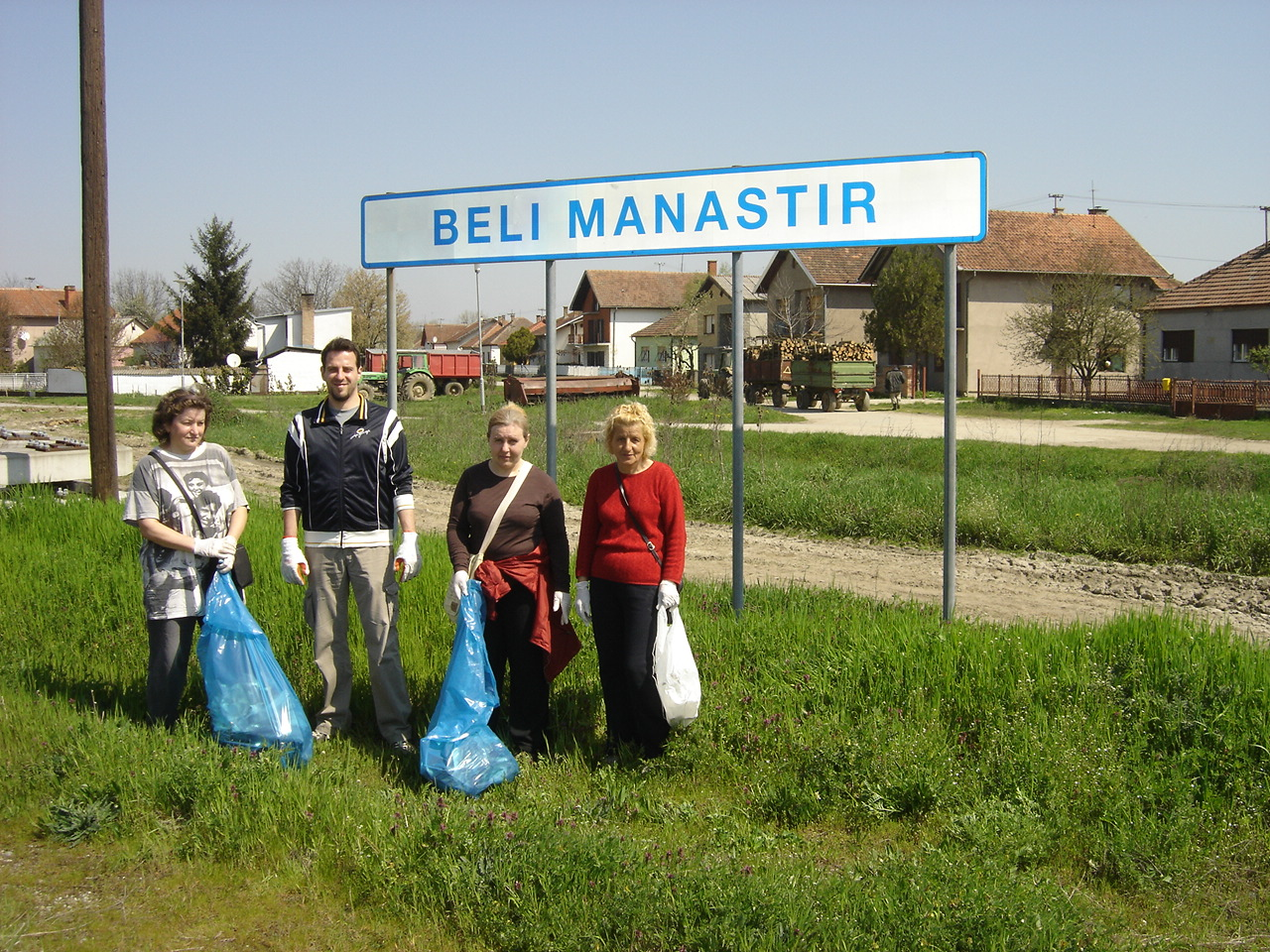 Zelena čistka u Belom Manastiru; na slici: Anica Frič, Neno Radić, Elvira Hegeduš i Donka Dvornić